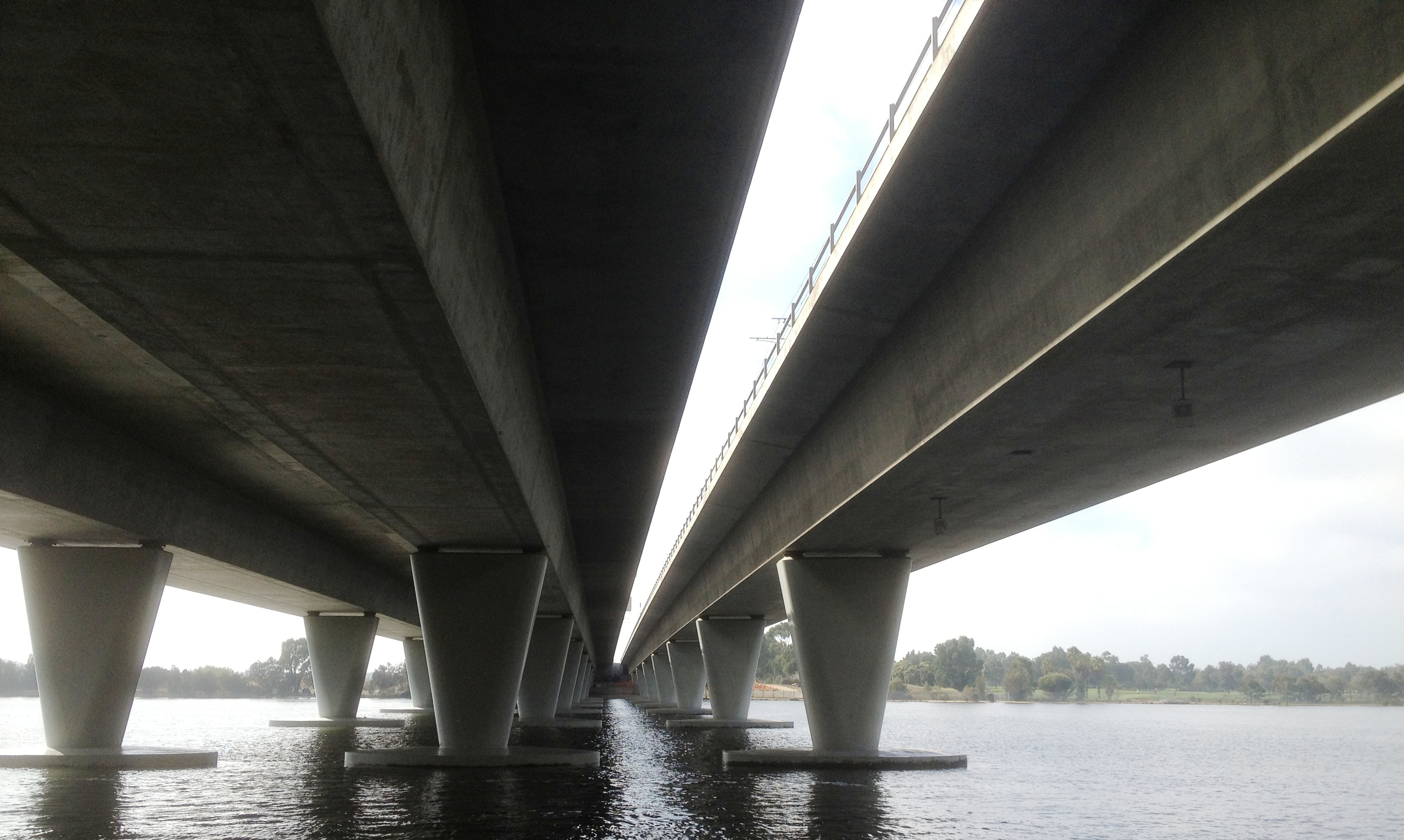 Windan-Goongoonup Bridges